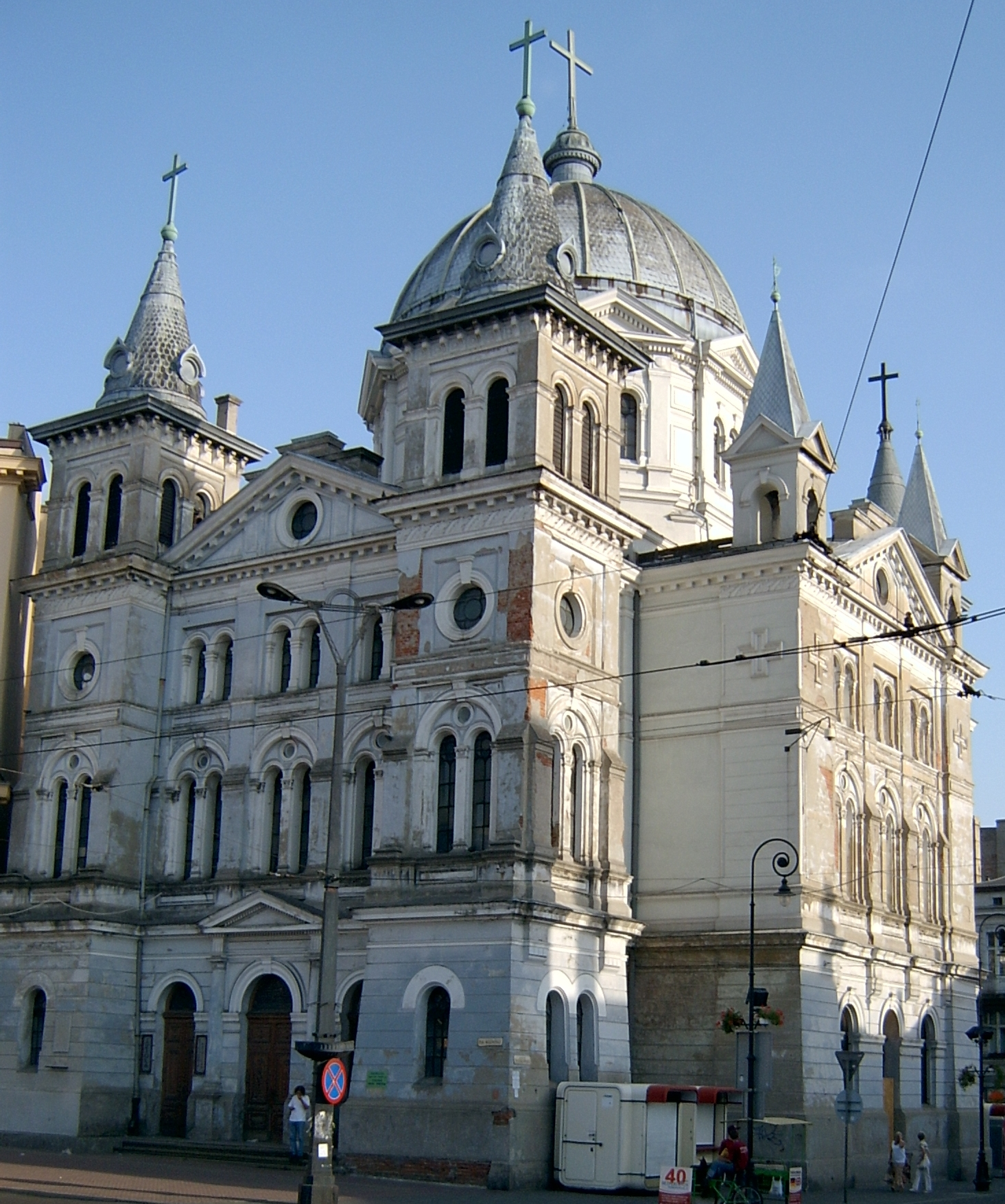 Kościół pod wezwaniem Zesłania Ducha Świętego w Łodzi